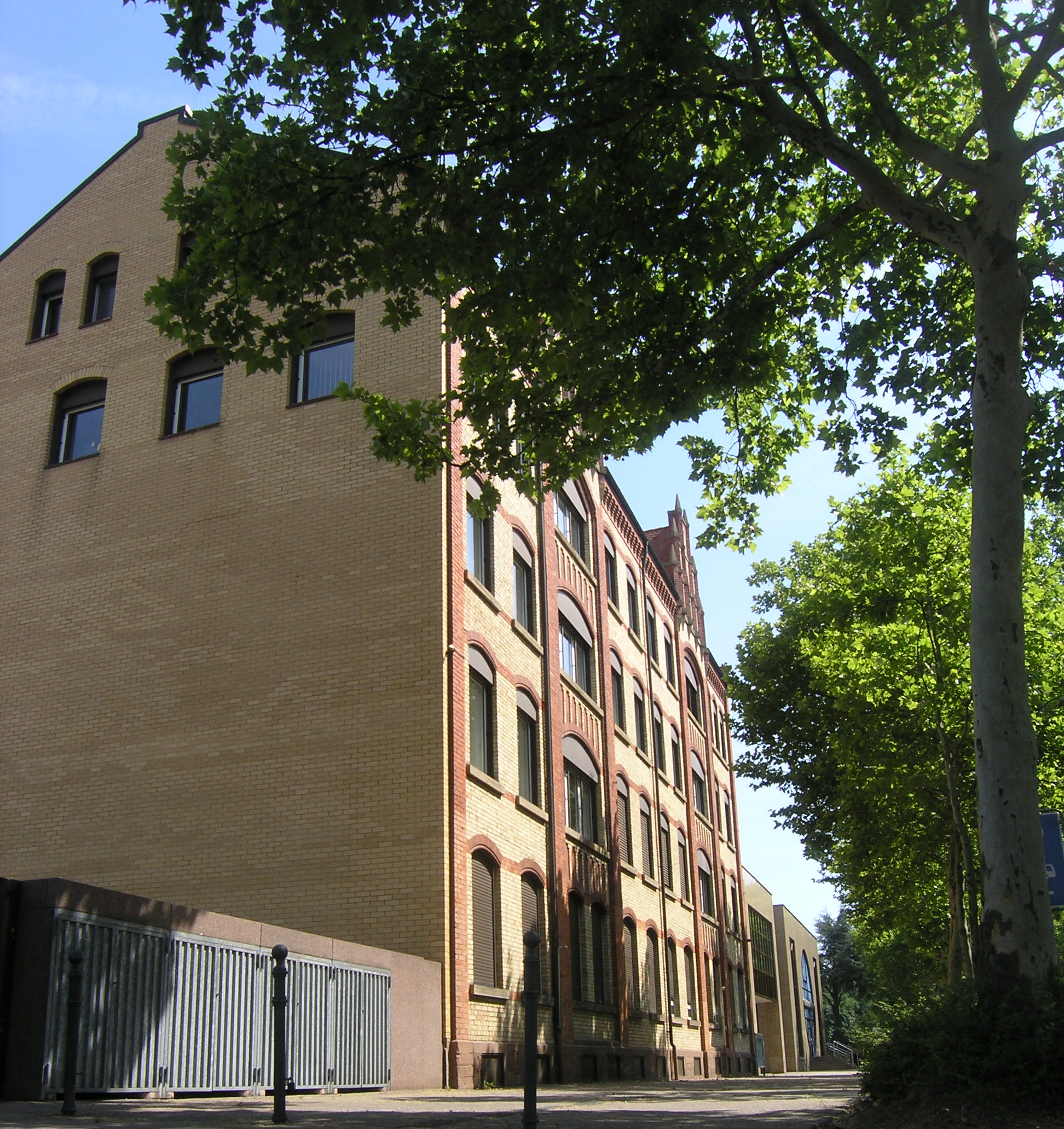 Maschinenhaus der Möbelfabrik Reutlinger in Karlsruhe, 1899 von Gustav Ziegler. Jetzt Missionswerk Karlsruhe